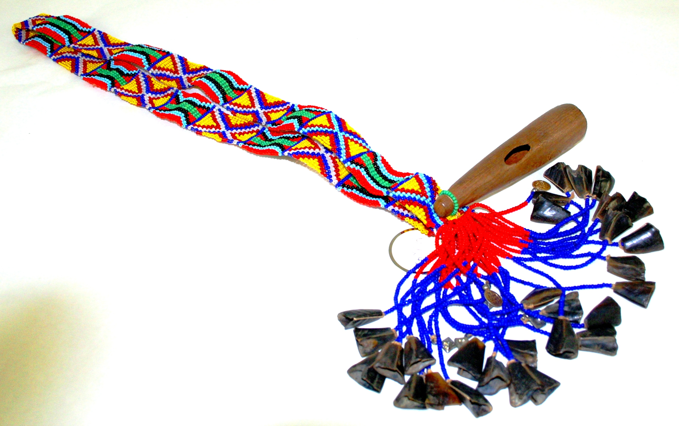 Kette aus Kunststoffperlen